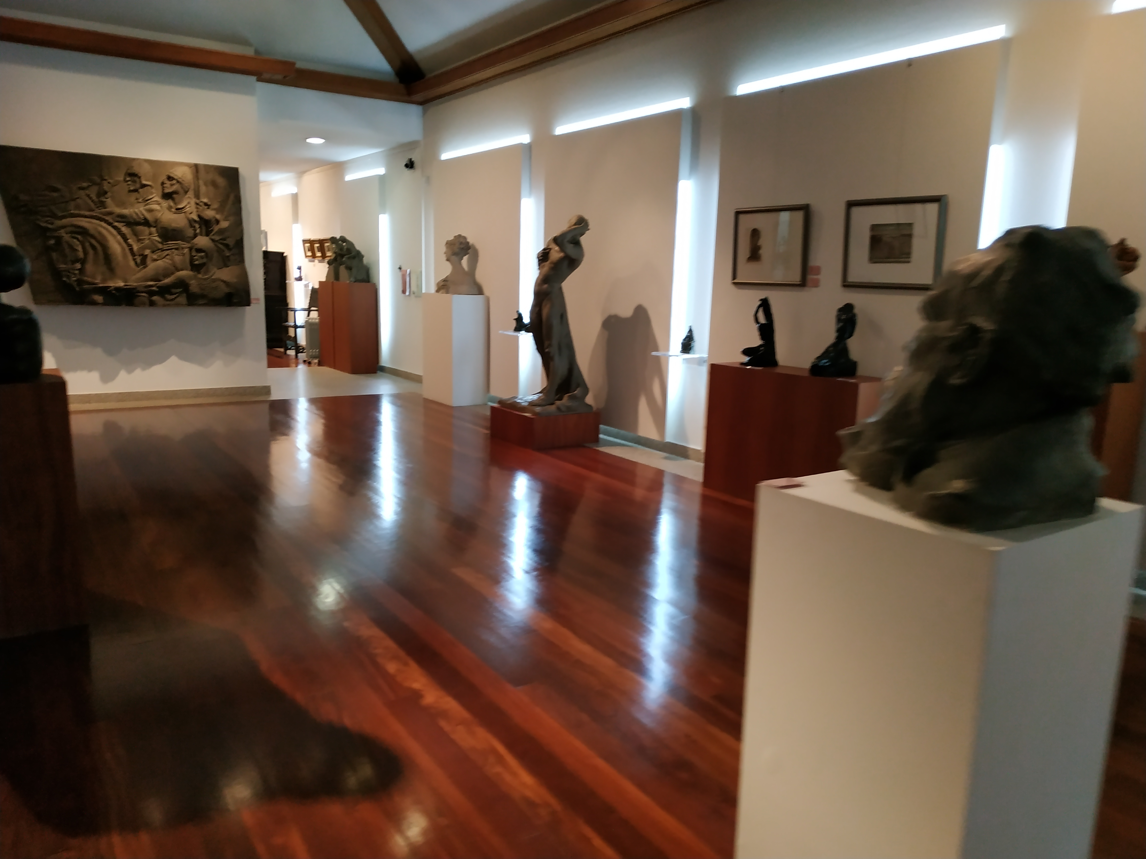 Vila Nova de Gaia, Portugal